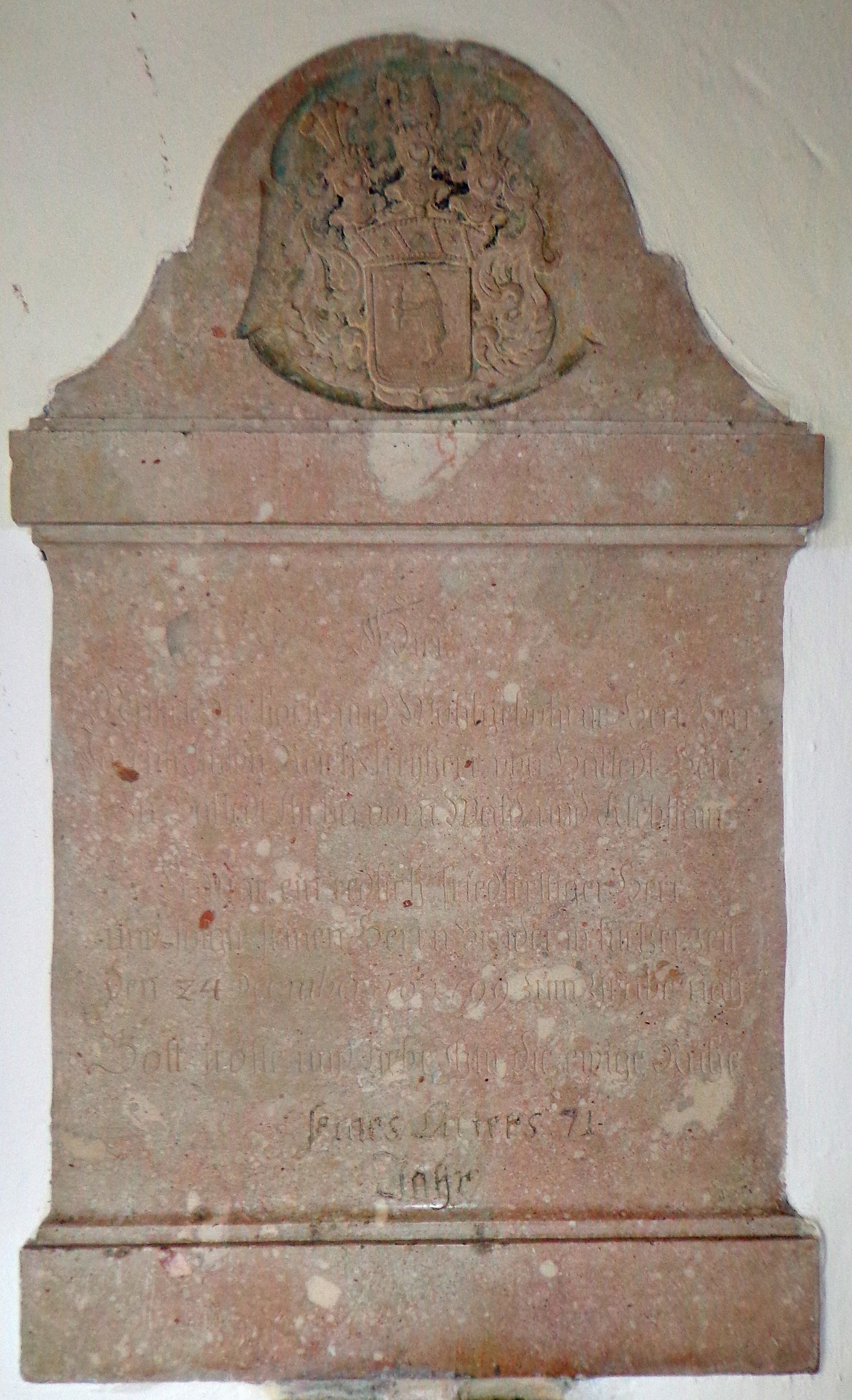 Grabdenkmal des Joseph Anton von Hackledt (+ 1799) in der Pfarrkirche von Sankt Marienkirchen bei Schärding. Eine wissenschaftliche Bearbeitung liegt vor in SEDDON Christopher R., Die inschriftlichen Denkmäler der Herren und Freiherren von Hackledt. Grablegen, Memoria und Repräsentation eines Innviertler Landadelsgeschlechtes, Wien (Dipl. Arb.) 2002, S. 209-211.